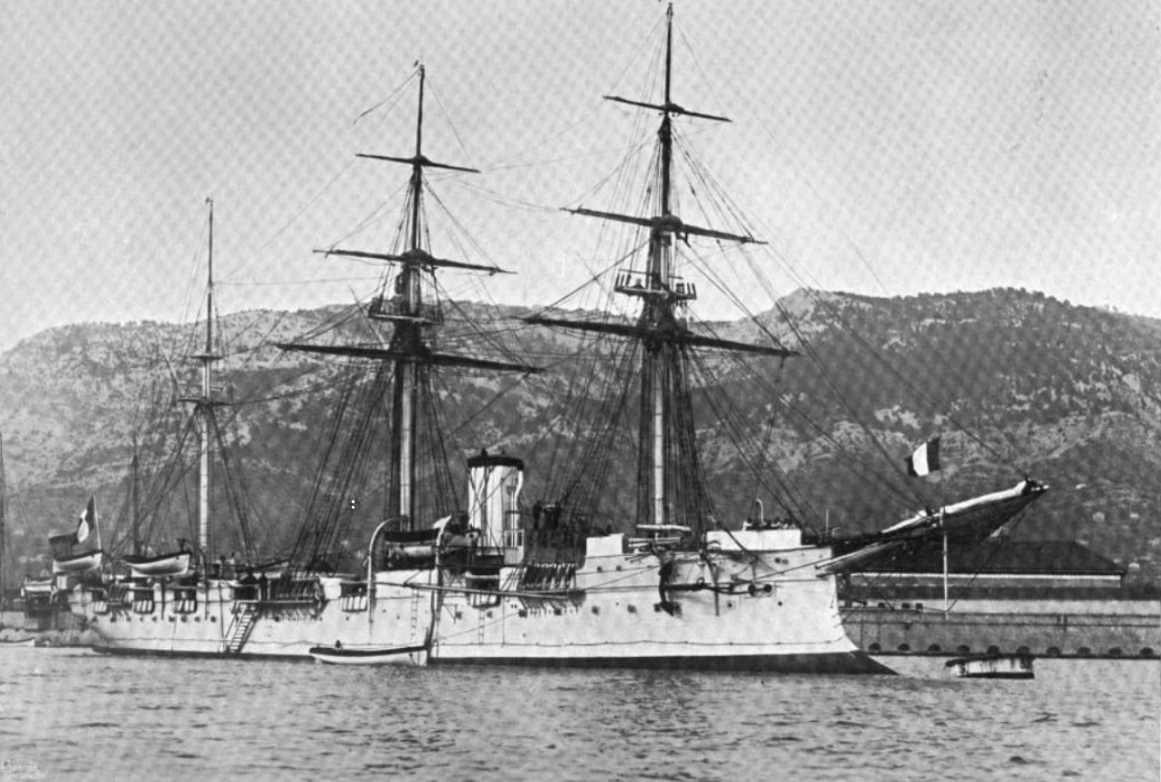 Lapérouse-class cruiser